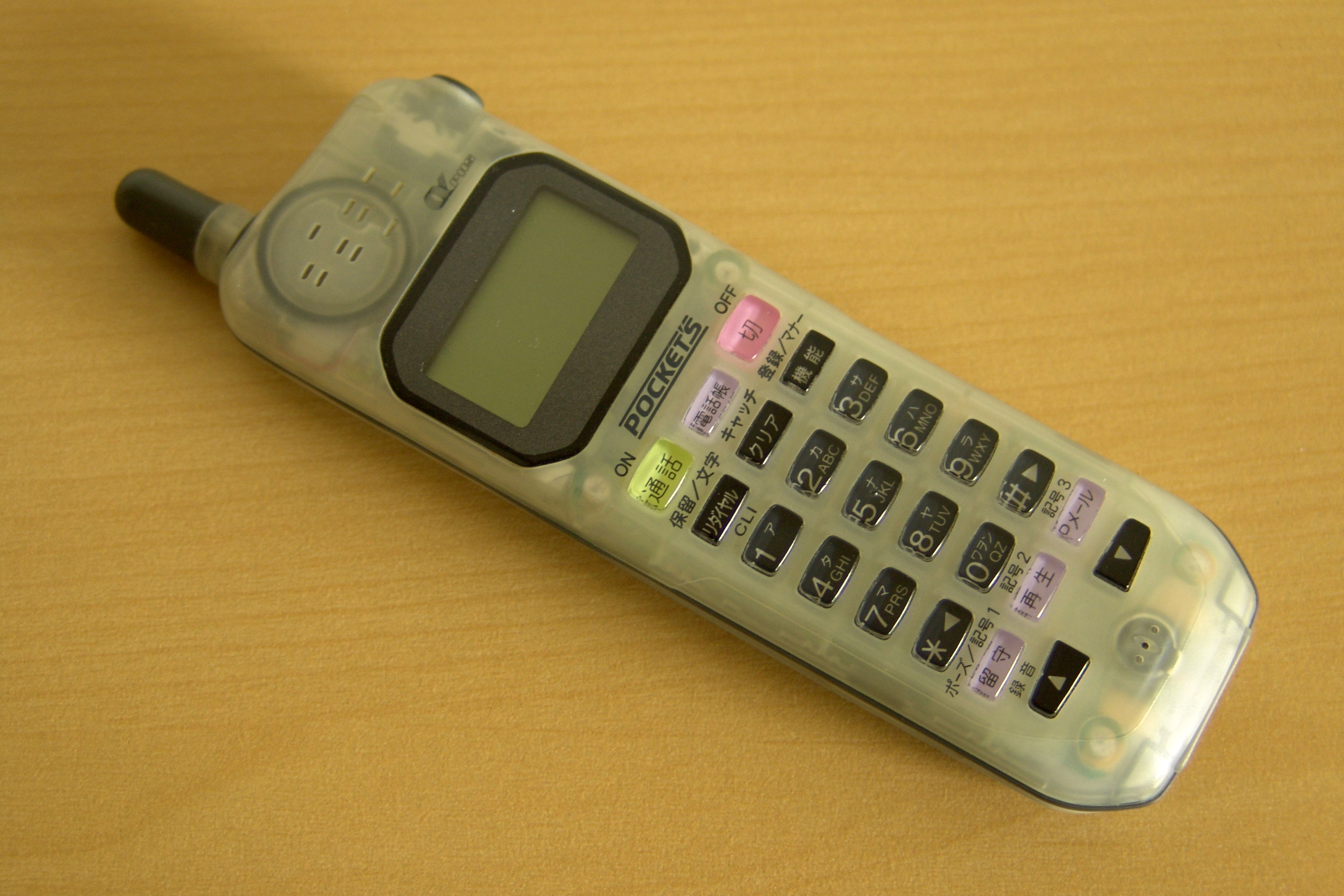 97年、当時のDDIポケットから出ていた京セラのPHS、PS-702のスケルトンタイプ。思えば初めてのケータイ（PHS）だったなぁ。当時は”みなし音声”というアナログ通信方法でPowerBook Duo230をネット接続していたのを思い出します（遠い目）。基本的にストレート派なので、このPS-702はとても気に入って愛用してた。すごくシッカリした造りで、手に持った質感も良好。ある意味、良い時代でした。(´∀｀) （でもPHS故の電波の弱さに結局、携帯電話に買い替えてしまったのだけれどもねぇ）